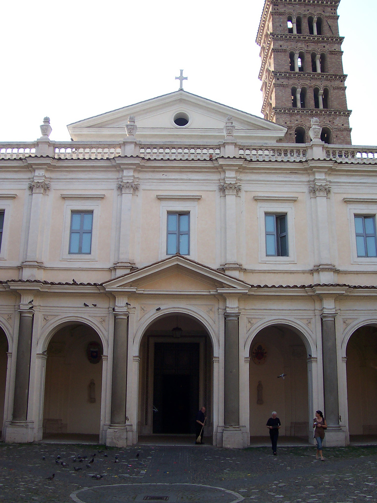 Santi Bonifacio e Alessio, church of Rome